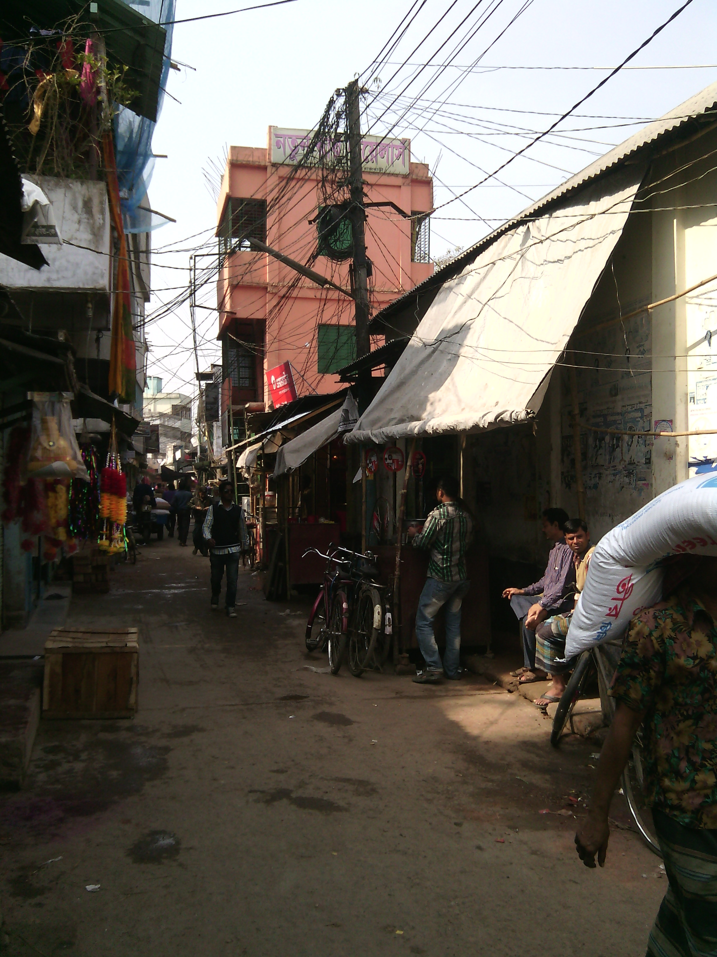 ঘোষপট্টি এলাকার গলি। ফটোগ্রাফঃ তন্ময় দত্ত